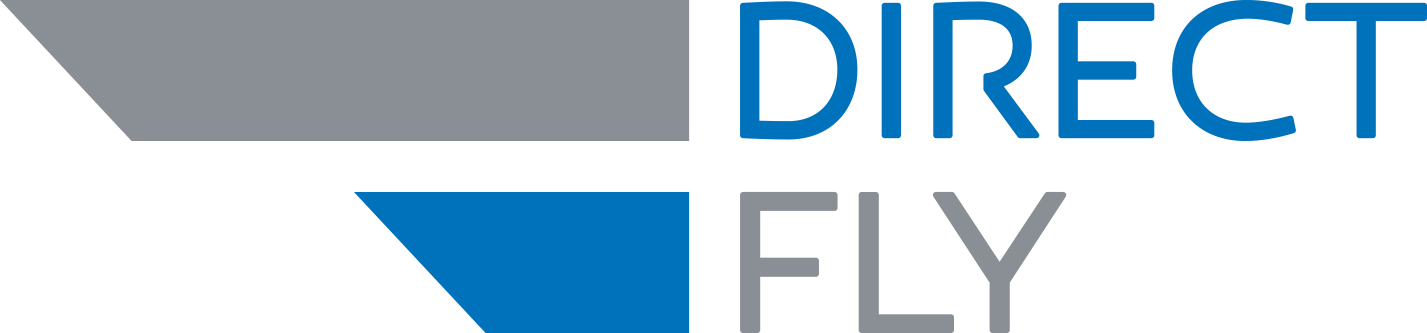 Firemní logo